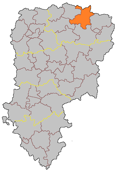 Кантон Ла-Капель на карте департамента Эна